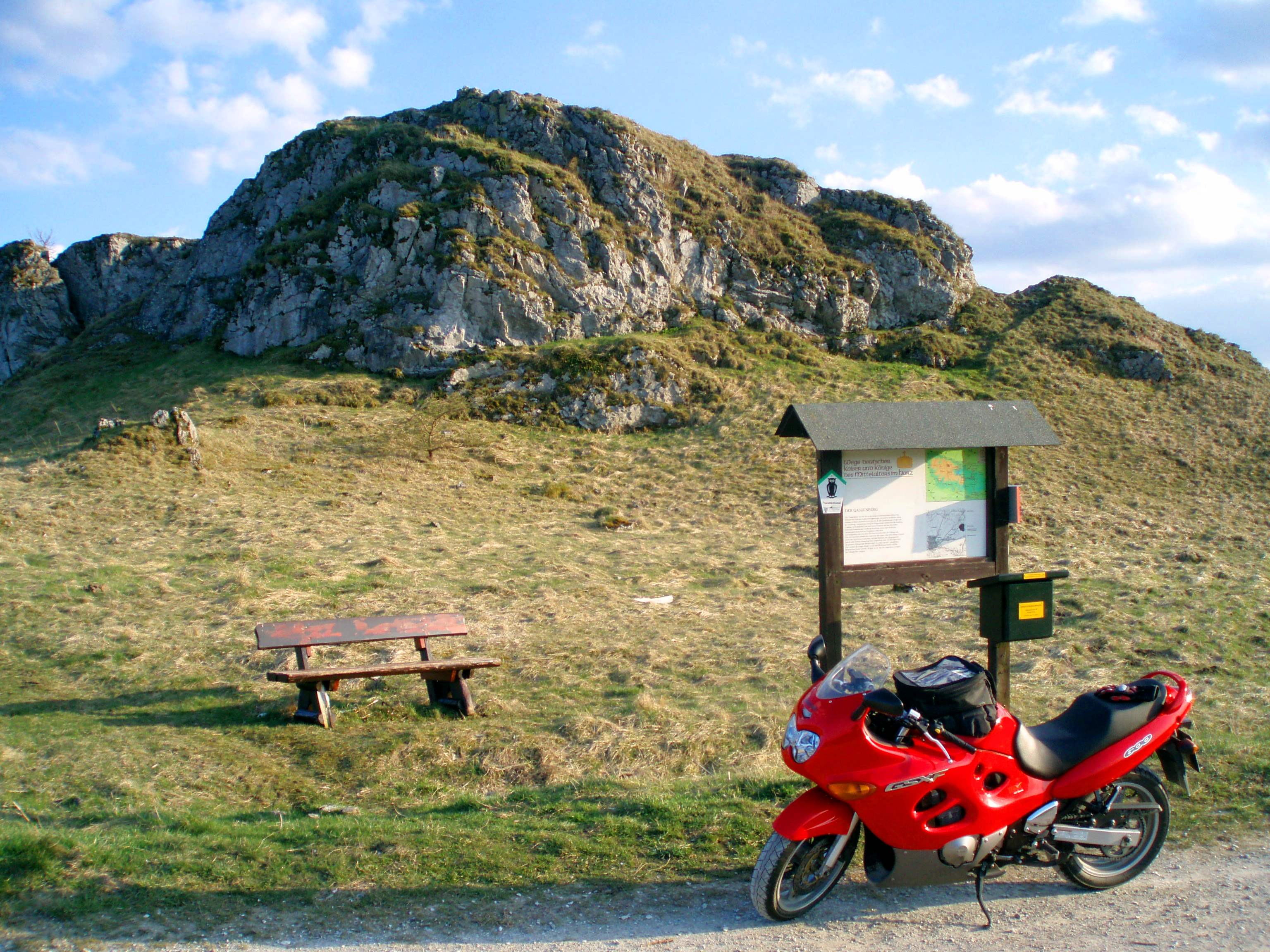 Galgenberg bei Elbingerode (Harz), Deutschland.